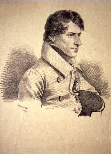 Franz Zeller von Zellenberg (1805-1878), österreichisacher Jurist und Maler als Zögling des Theresianums. Lithographie von Josef Kriehuber, 1828